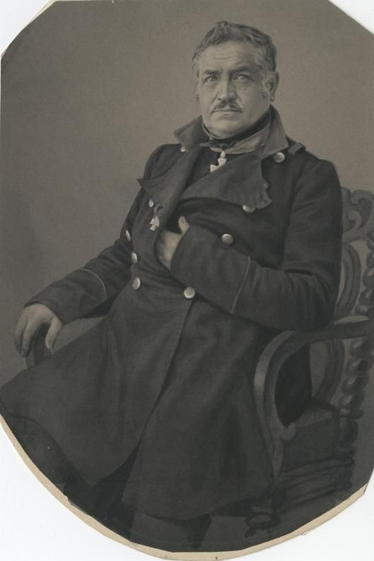 Moritz von Kotzebue (1789–1861) német altábornagy, szenátor